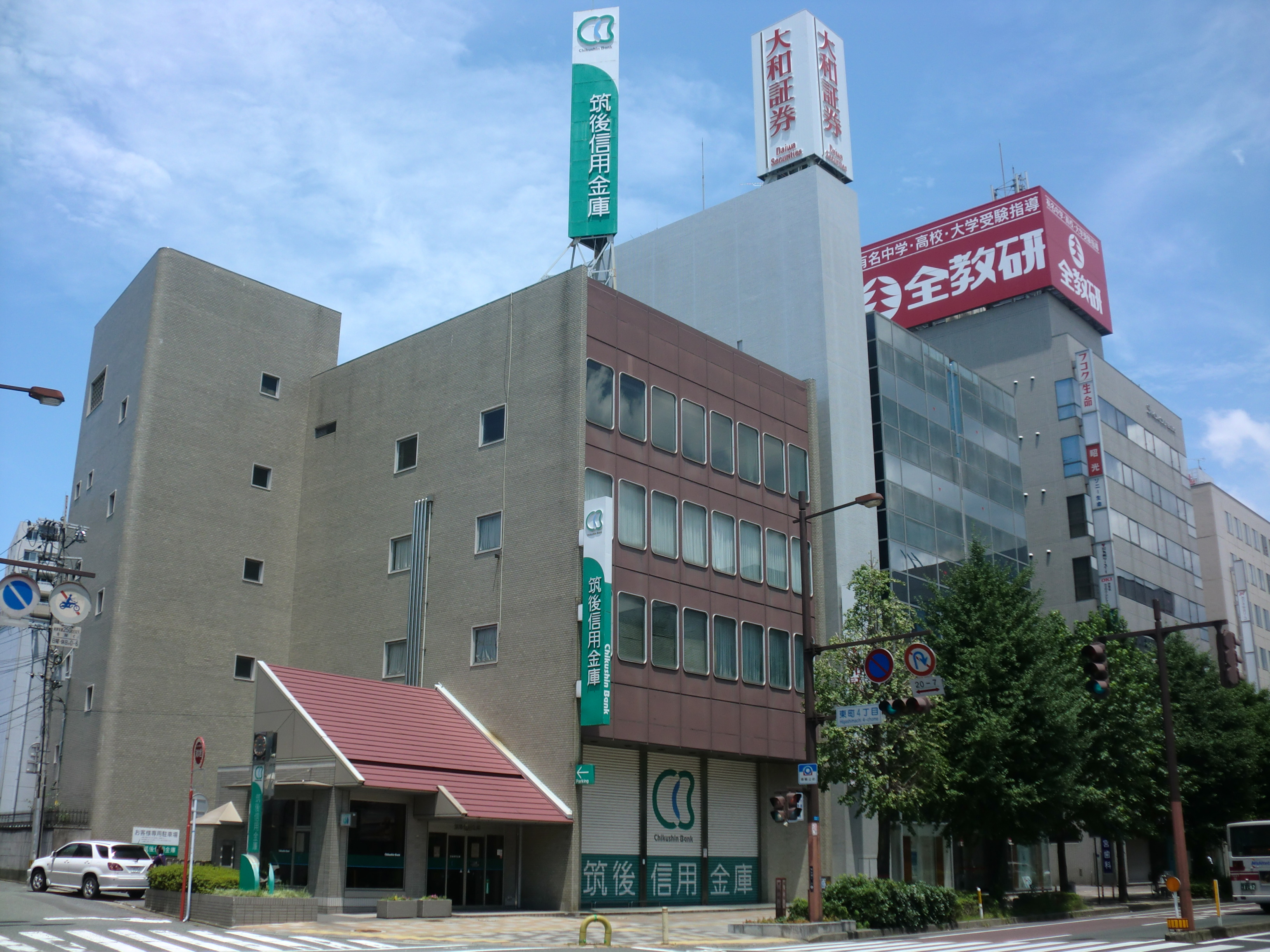 福岡県久留米市にある筑後（ちくご）信用金庫本店